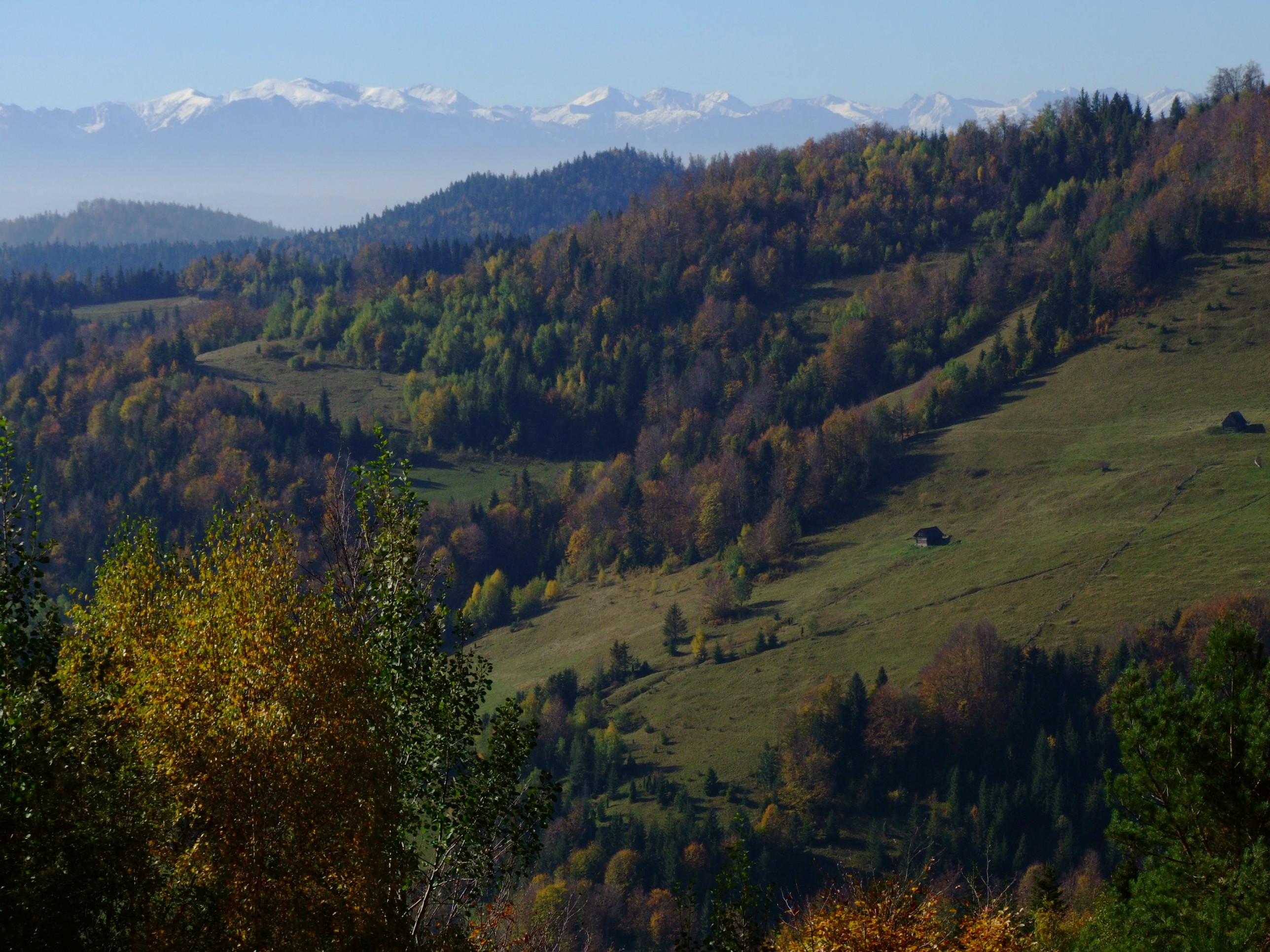 Gorce (dolina potoku Jamne) i widok na Tatry